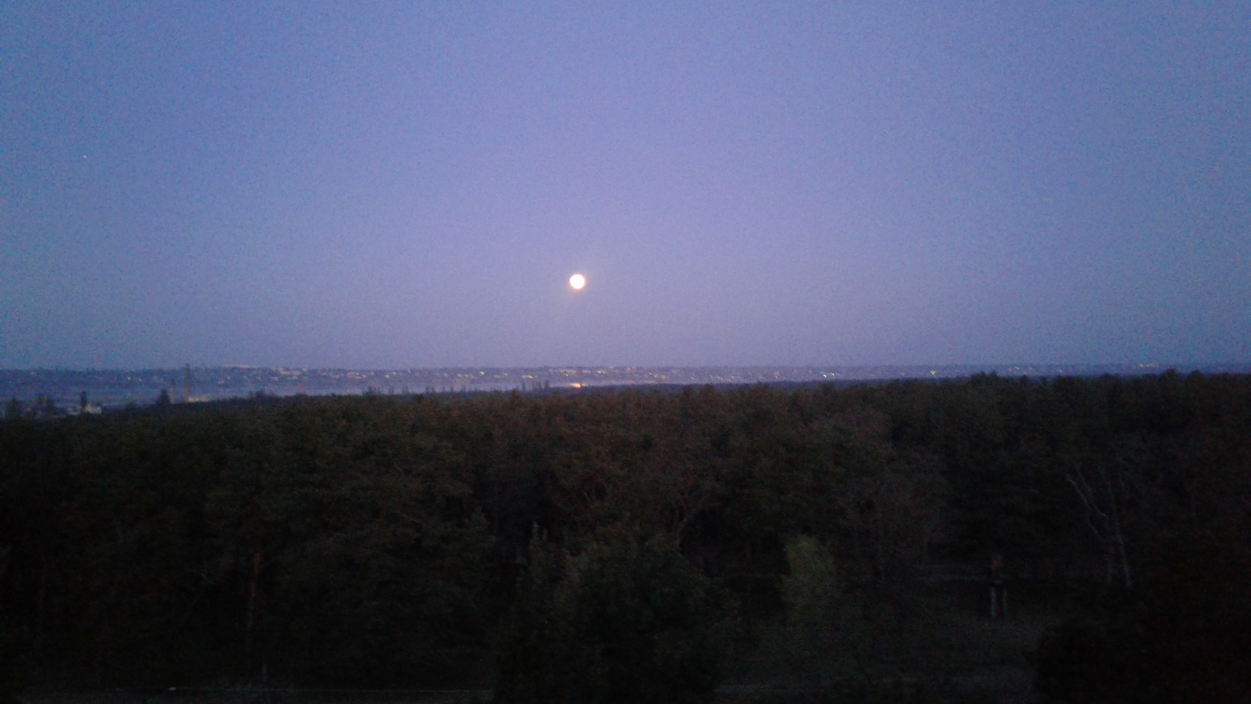 Знято мобілкою Самсунг